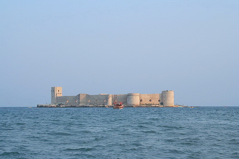 Kızkalesi, Erdemli, Mersin